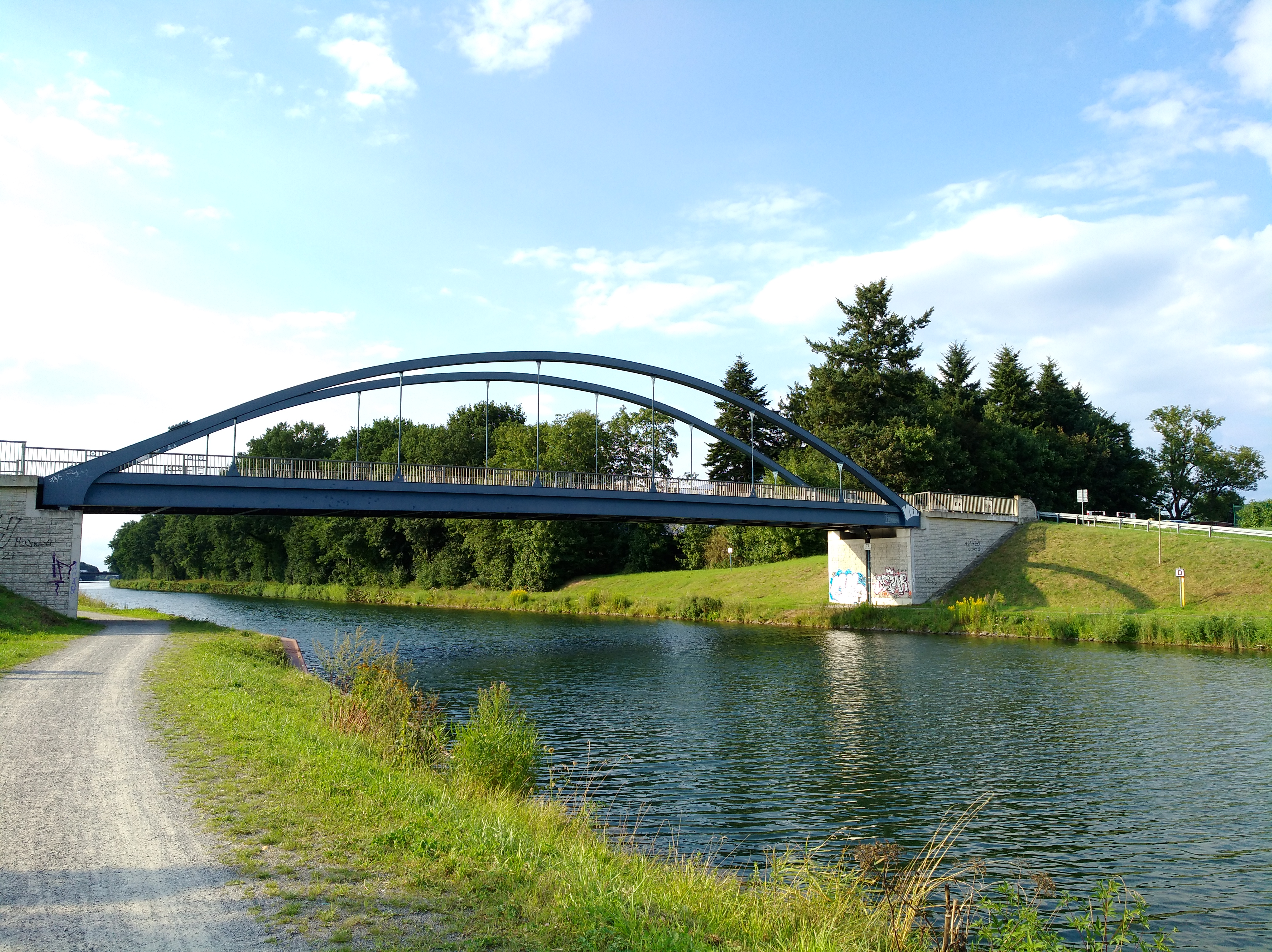 Die Straßenbrücke "To Pye" über den Stichkanal Osnabrück, ungefähr bei Kanalkilometer 9,0, Blickrichtung Nord-West.